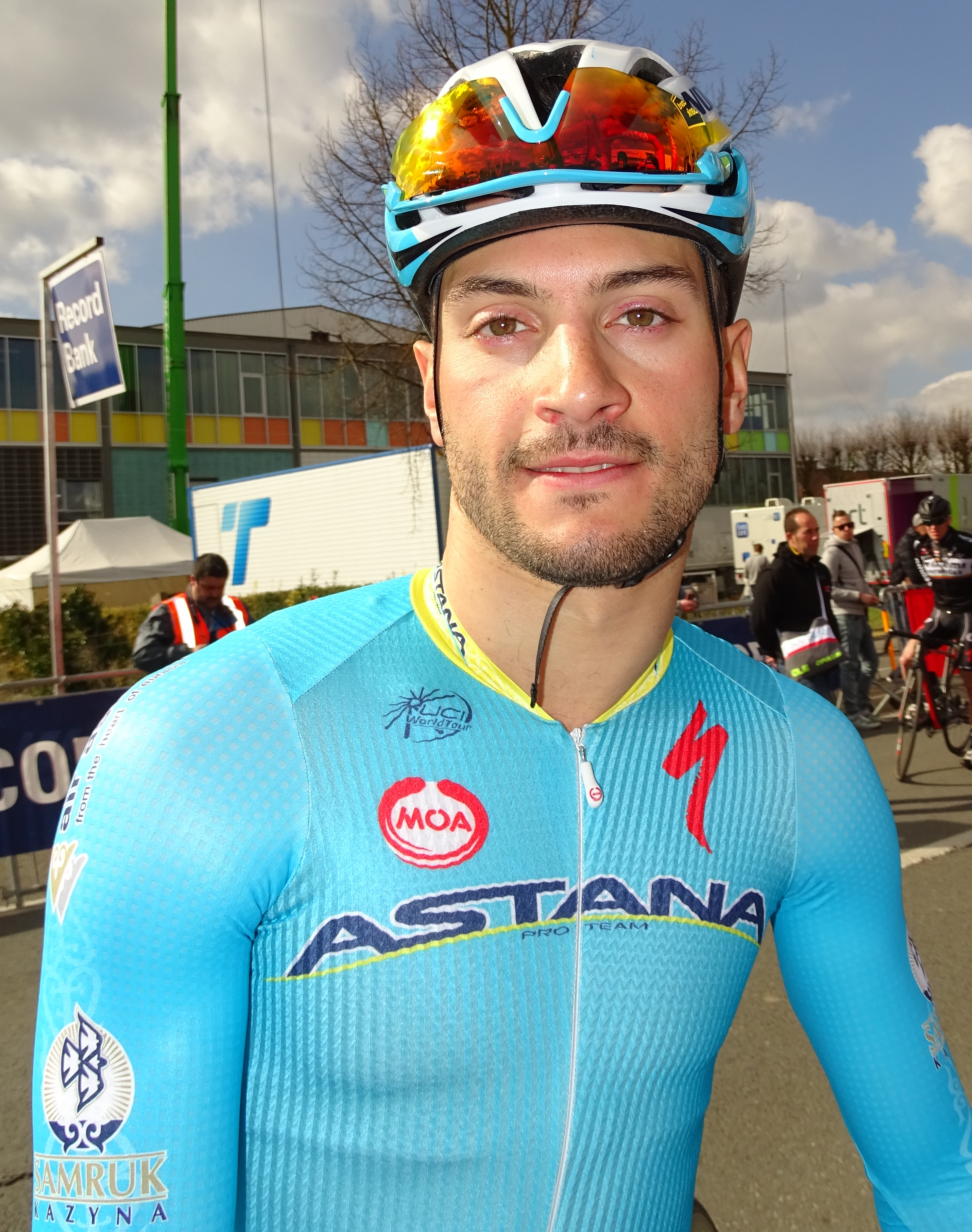 Reportage réalisé le vendredi 27 mars à l'occasion du départ et de l'arrivée du Grand Prix E3 2015 à Harelbeke, Belgique.